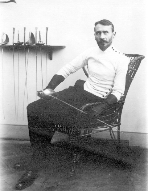 Vilém Goppold z Lobsdorfu (1869 - 1943), Český šermíř.